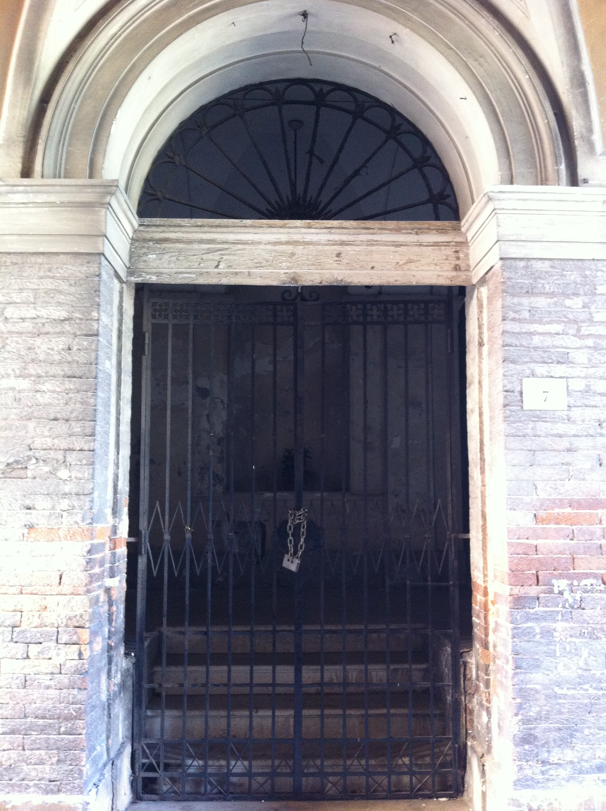 Arco di Porta Melatina: ingresso esterno alla chiesa di Sant'Antonio Abate